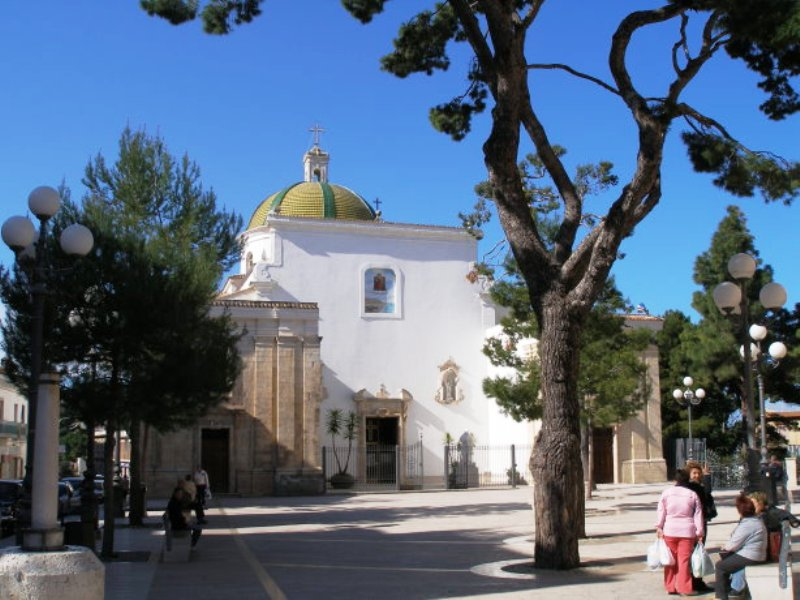 Piazza Giovanni XIII Rodi Garganico, in secondo piano la Chiesa della Madonna della Libera.